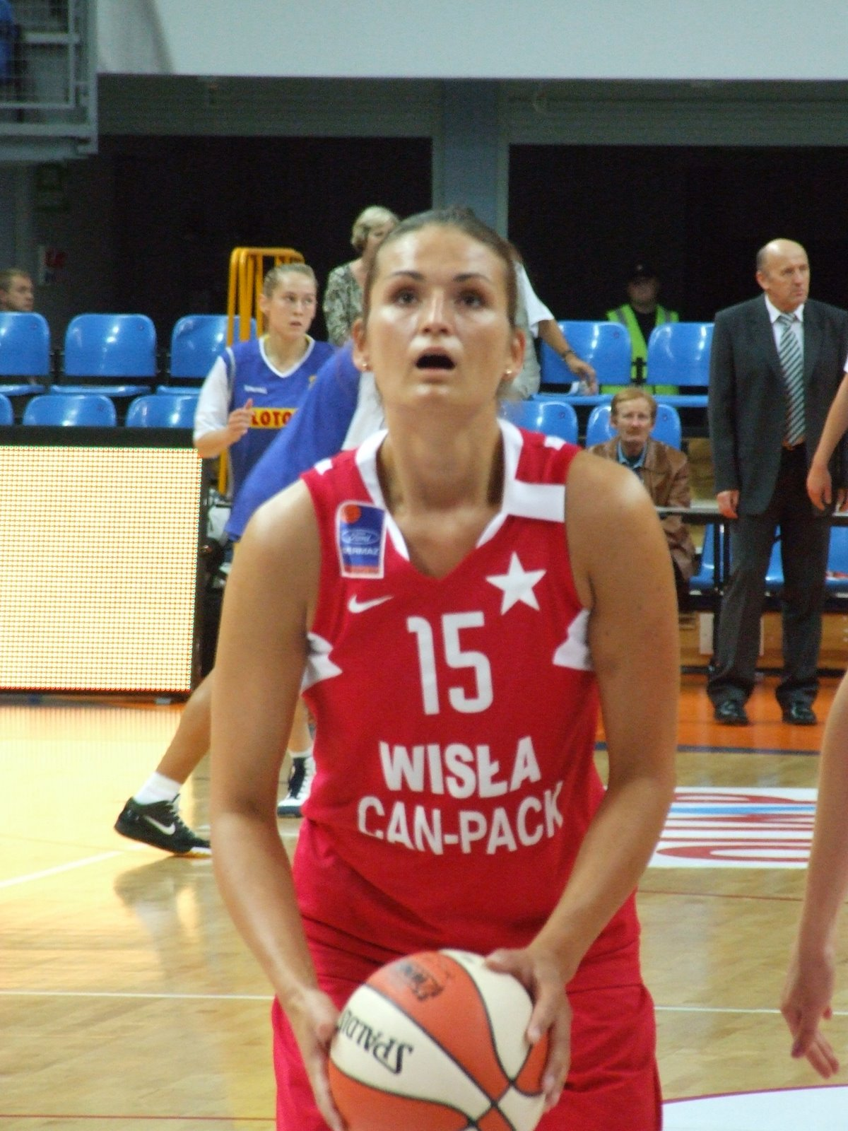 Dorota Gburczyk w 2009 roku.